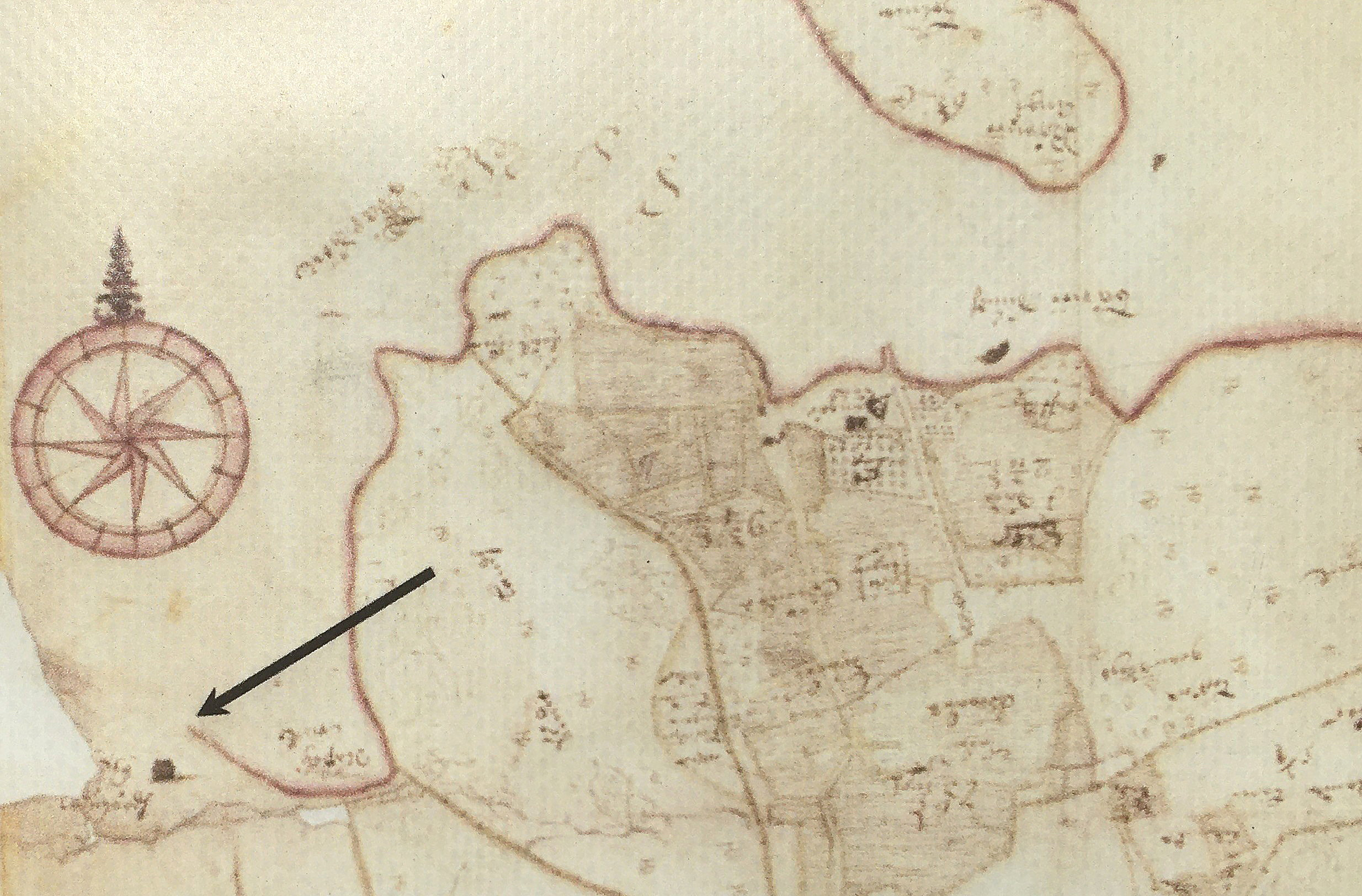 Karta över Bornö och Näsby